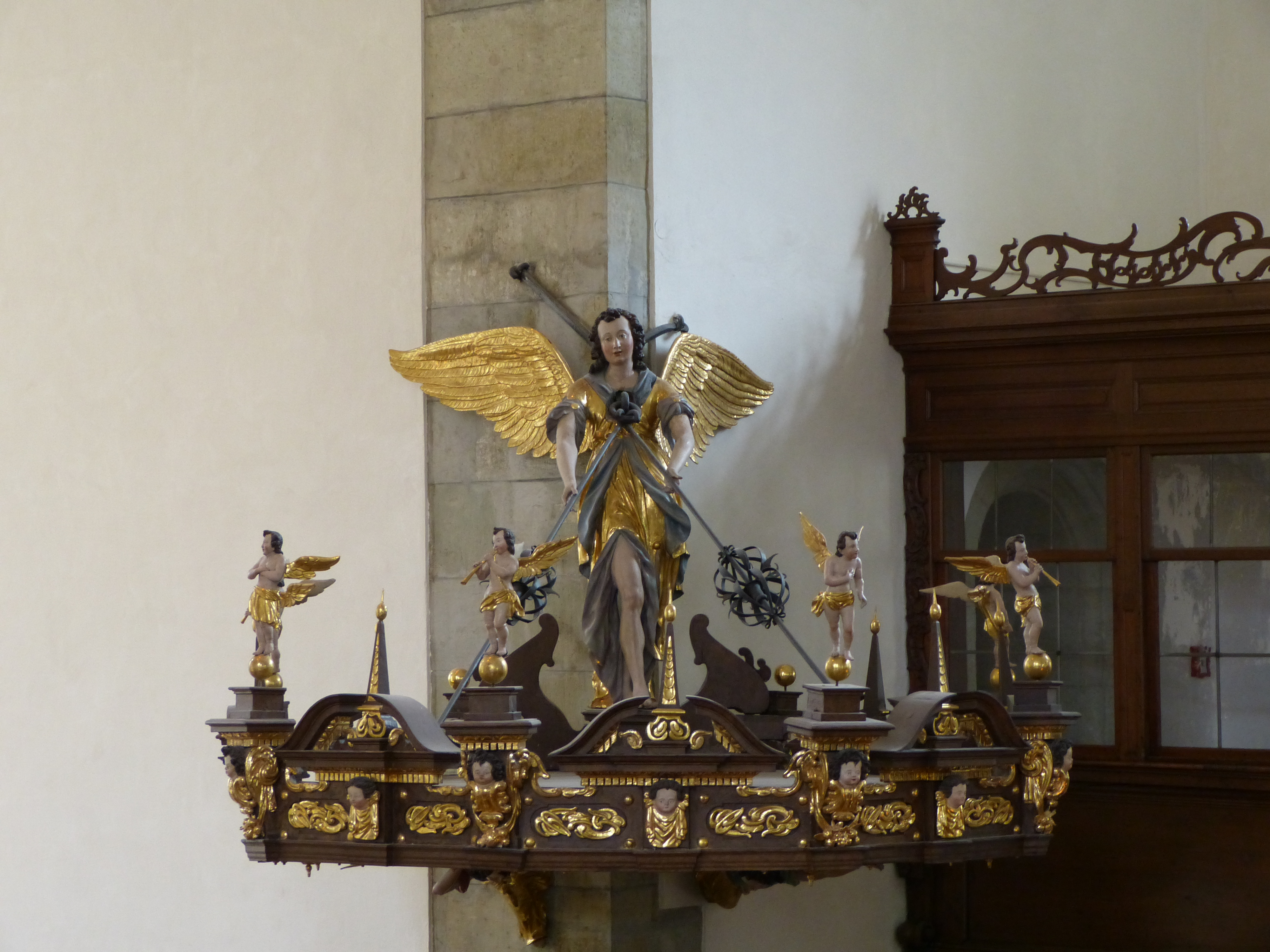 Schalldeckel der Kanzel (Hintergrund Loge auf der Südempore) in der Dreieinigkeitskirche, Regensburg, Bayern